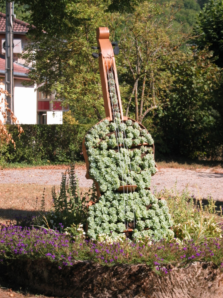 Vue sur un espace vert aménagé en violon(ou violoncelle) à Mirecourt capitale de la lutherie (France, département des Vosges).Géographie Mirecourt est le chef lieu de canton d’un territoire situé au coeur de la Plaine des Vosges : le Xaintois. La ville se s’organise principalement sur le versant ouest du vallon du Madon .Elle se développe en palier successif pour atteindre au final les rives sinueuses de la rivière. De ce point bas, Mirecourt offre aux visiteurs un spectacle des plus pittoresque qui laisse apercevoir un bâti remarquable tant par sa richesse architecturale que par le contexte environnemental du site. La cité de Mirecourt fut fondée au cours du premier millénaire. Elle devint, les siècles passant l’une des plus riche bourgade du Duché de Lorraine grâce à une grande activité de négoce. Dès le XVI ème siècle les Ducs de Lorraine y introduire le savoir faire des Maître italiens dans la fabrication des violons, savoir faire qui se perpétue jusqu'à nos jours. Mais parallèlement à cette activité de lutherie, Mirecourt devint et est toujours un haut lieu de la facture d’orgues. Mais les différents accidents de l’histoire ont mis un frein à ces luxuriantes activités